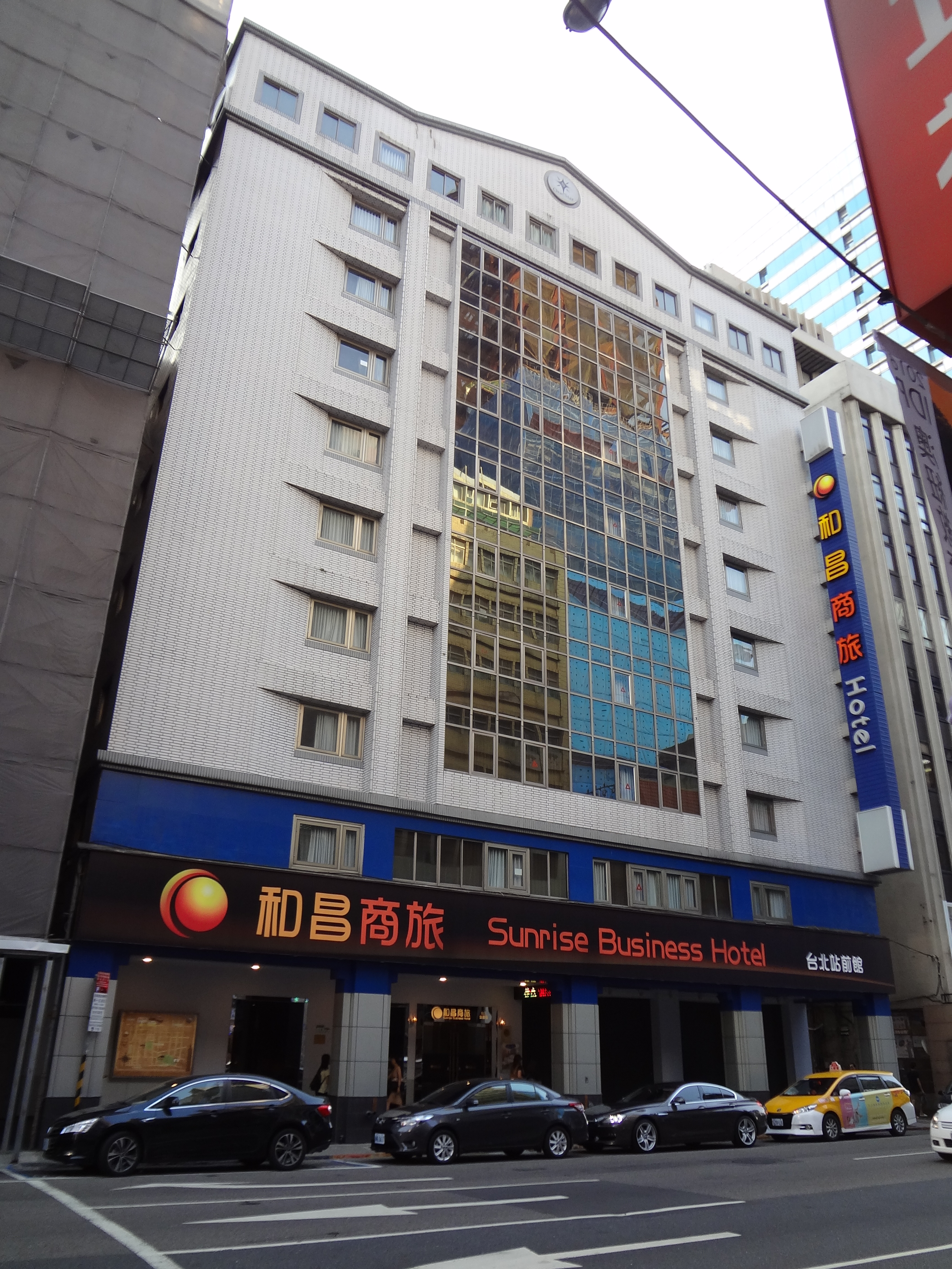 中文（台灣）: 和昌商旅台北站前館，位於臺北市中正區重慶南路一段18號（臺灣書店門市部原址）。